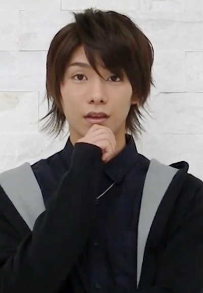 北川尚弥（俳優）